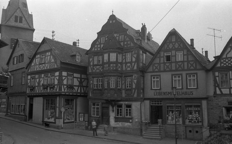 Besuch japanischer Schüler in der Bundesrepublik Besichtigung von Idstein/Taunus